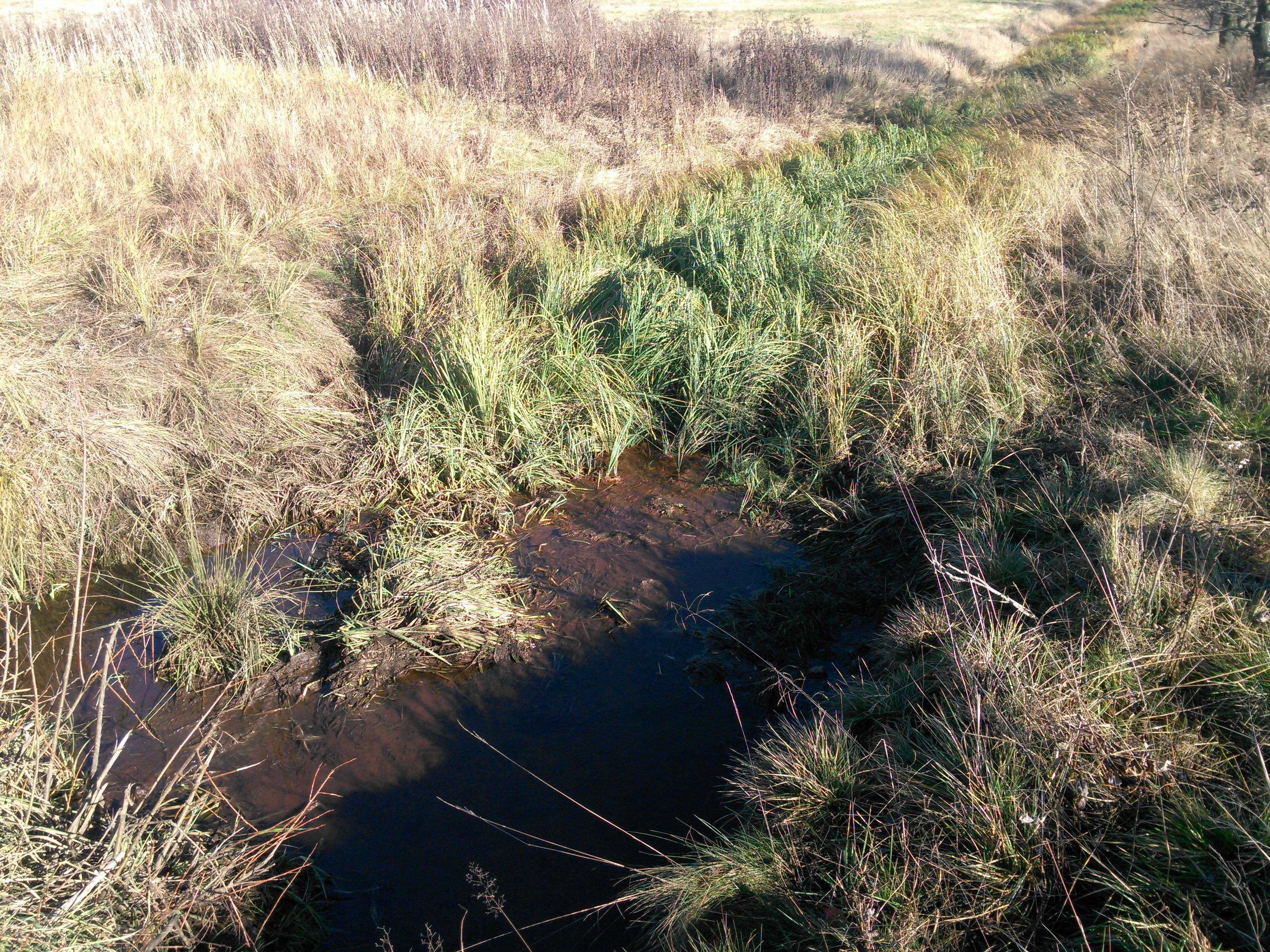 Pramen.